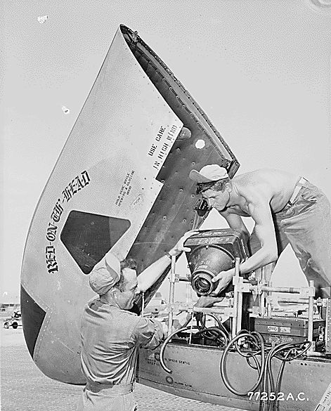 Historische Luftbildkamera Public Domain ARC Identifier: 542195 CAMERA TRI-POD, JET PROPELLED. Cameramen mount a giant aerial camera in the nose of a speedy but otherwise unarmed U.S. Air Force jet fighter for a reconnaissance mission over communist North Korea. T/Sgt. Harry M. Hanst, 29, of 6512 Ventnor Avenue, Ventnor City, New Jersey and Cpl. Peter E. Grant, 21, 130 South First Street, Perth Amboy, New Jersey are the technicians installing the important "weapon." , ca. 08/1950